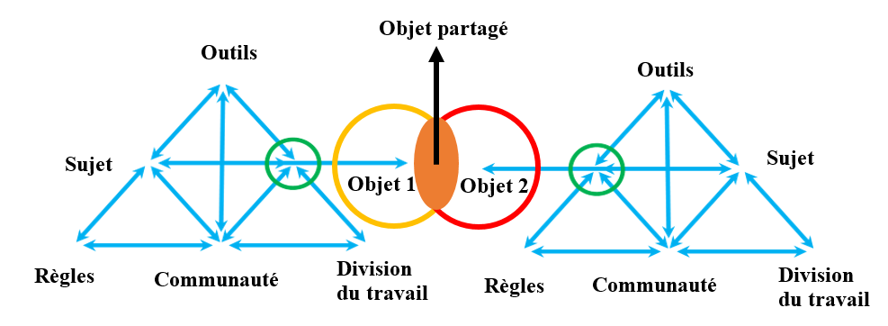 La troisième génération de la théorie de l'activité